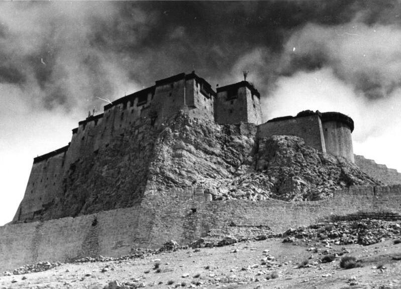 Kampadzong, die Burg